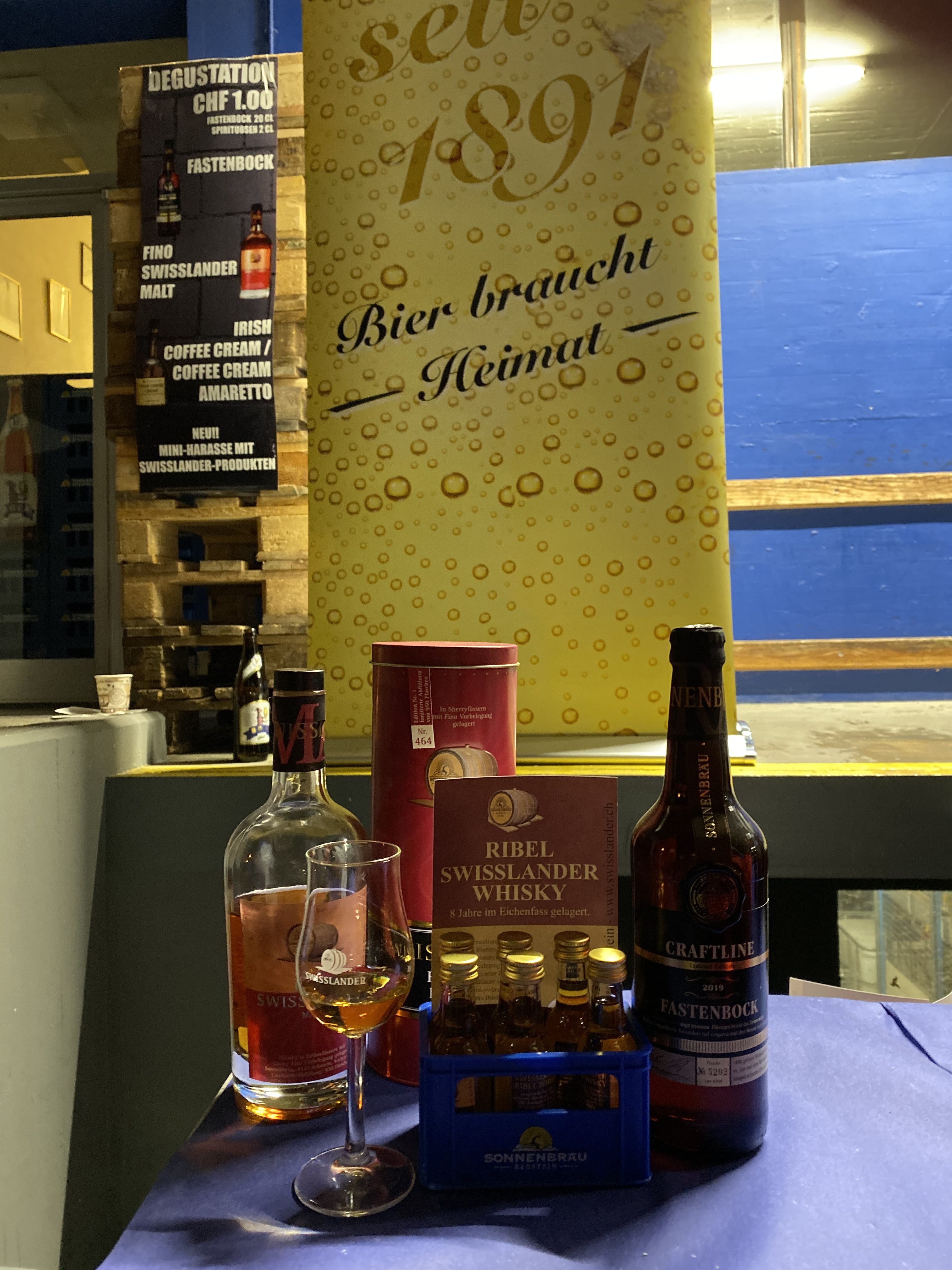 Sonnenbräu Bier baucht Heimat